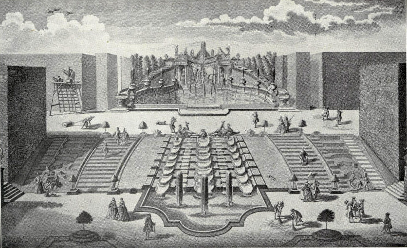 "Prospect du Fontaine deß Pluto und Proserpin mit einer vorliegenden Cascade" - Detailansicht der Pluto und Prosperpina-Grotte in der Favorite nach einem Stich von Salomon Kleiner, 1726